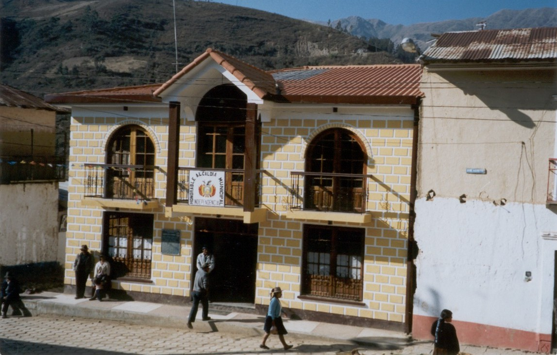 Alcaldia in Independencia, Dep. Cochabamba, Bolivien